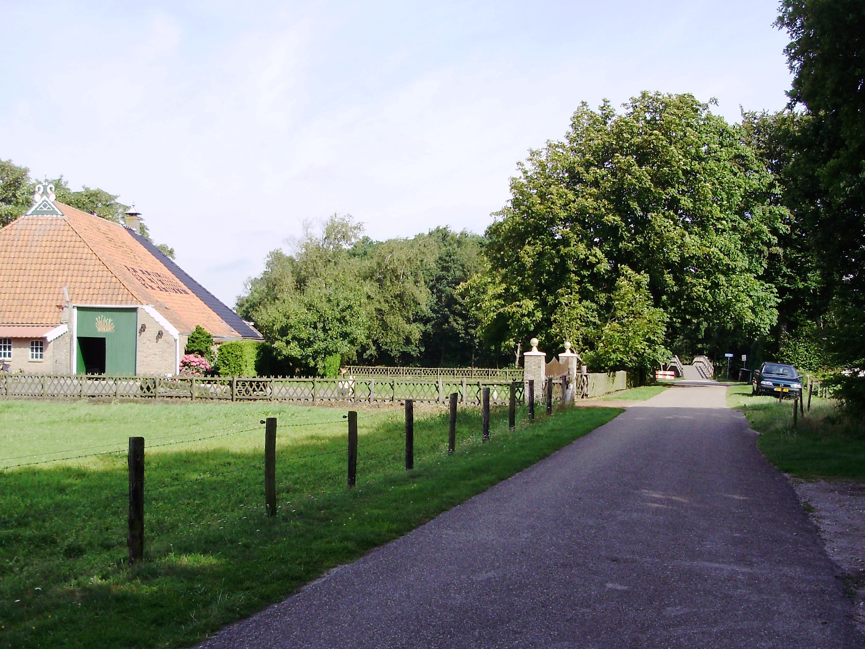 Buurtschap Schouw in gemeente Gaasterlân-Sleat in provincie Friesland